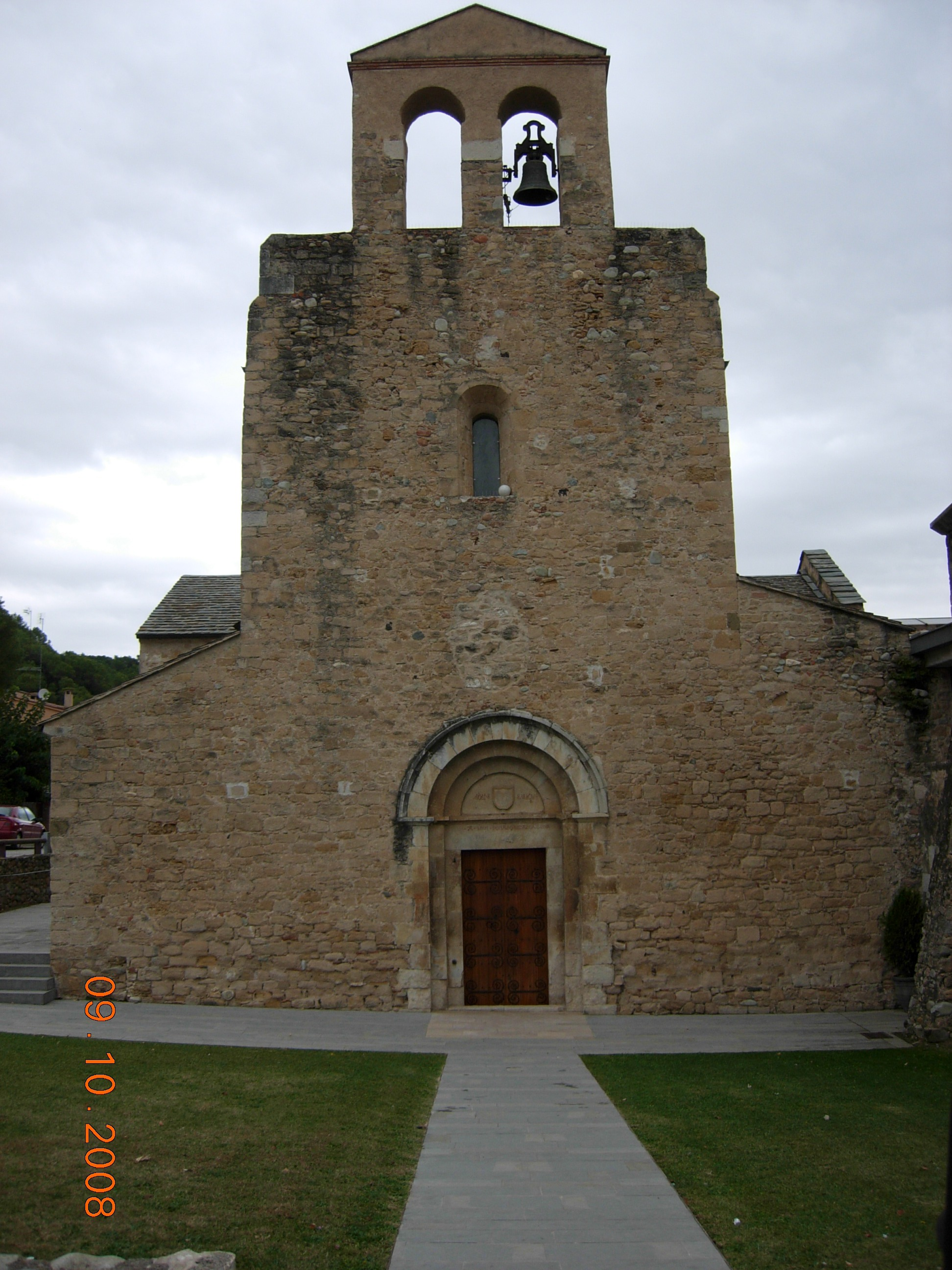 façana